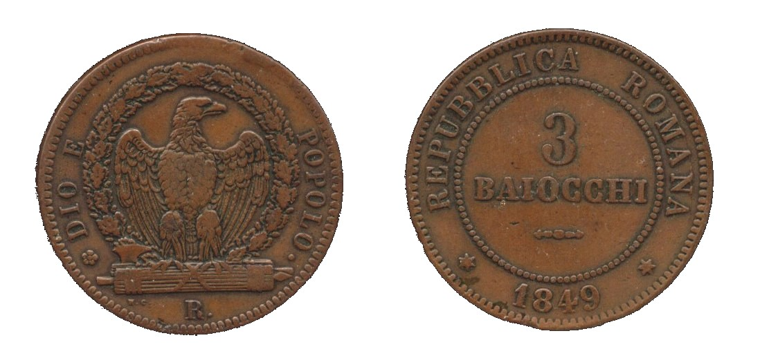 Roma - II repubblica romana (1849) 3 baiocchi di rame 25 g, ø 38 mm D/ Aquila spiegata in corona di quercia su fascio. Intorno DIO E POPOLO, rosetta e R (marchio di zecca). In piccolo N. C. (Niccolò Cerbara, l'incisore) R/ Il valore su due righe. Intorno REPUBBLICA ROMANA e la data tra due stellette. Su decreto dell'Assemblea Costituente del 6 marzo 1849.